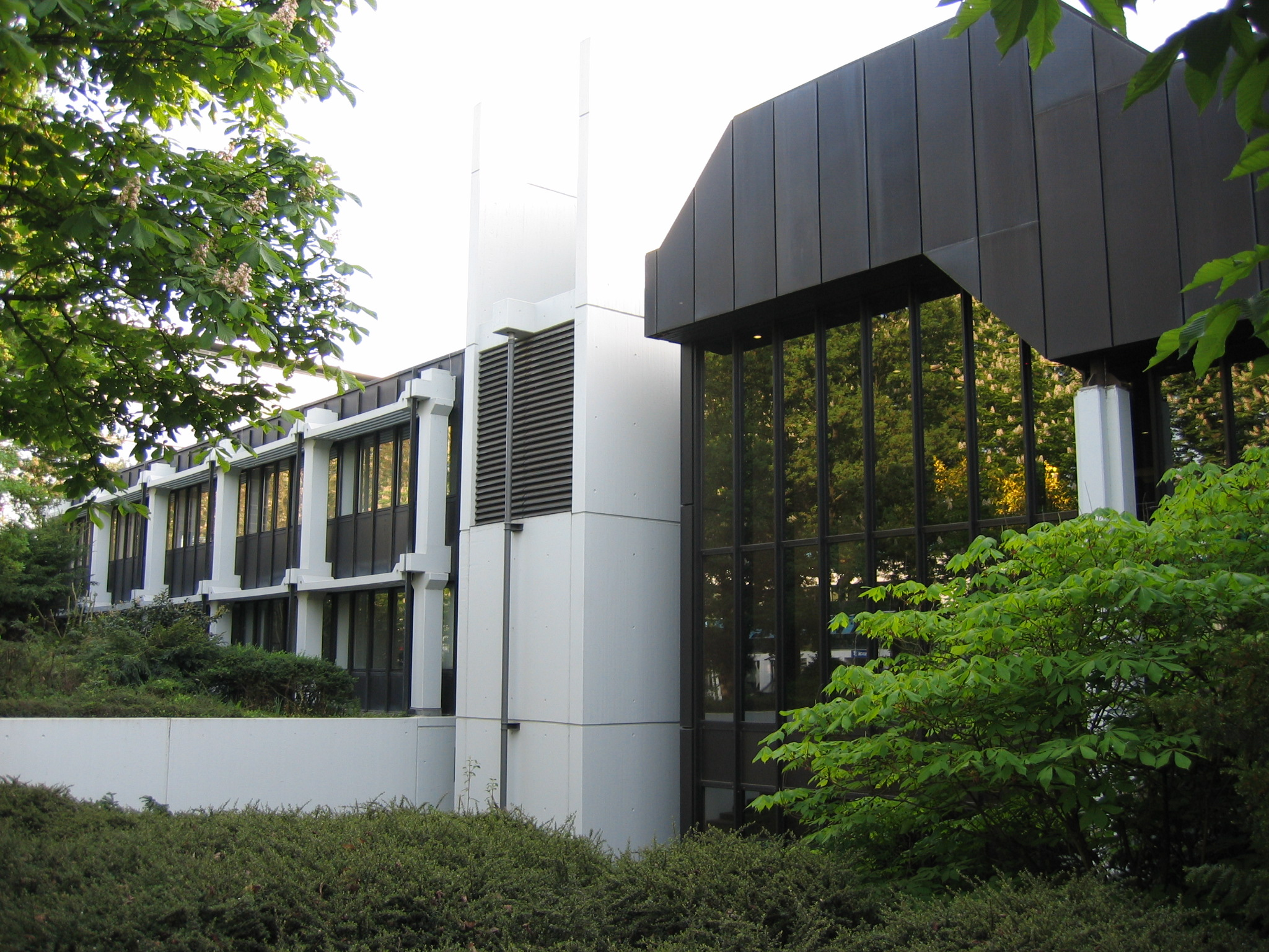 Erich-Ollenhauer-Haus, Bonn-Gronau. Gebäudeentwurf (Architekt): Novotny Mähner Assoziierte